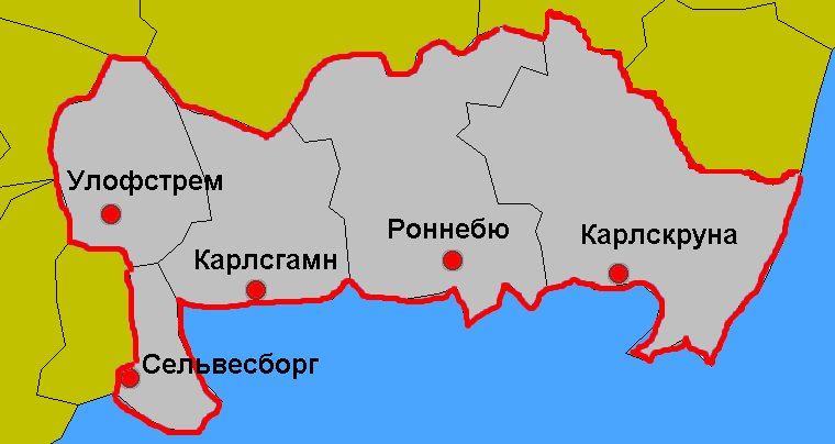 Карта адміністративного поділу лену Блекінге у Швеції. Карту створено на основі карти File:Blekinge Municipalities.png.